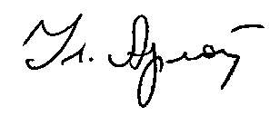 Podpis Uładzimira Arłoua wykonany 25 marca 2016 roku.